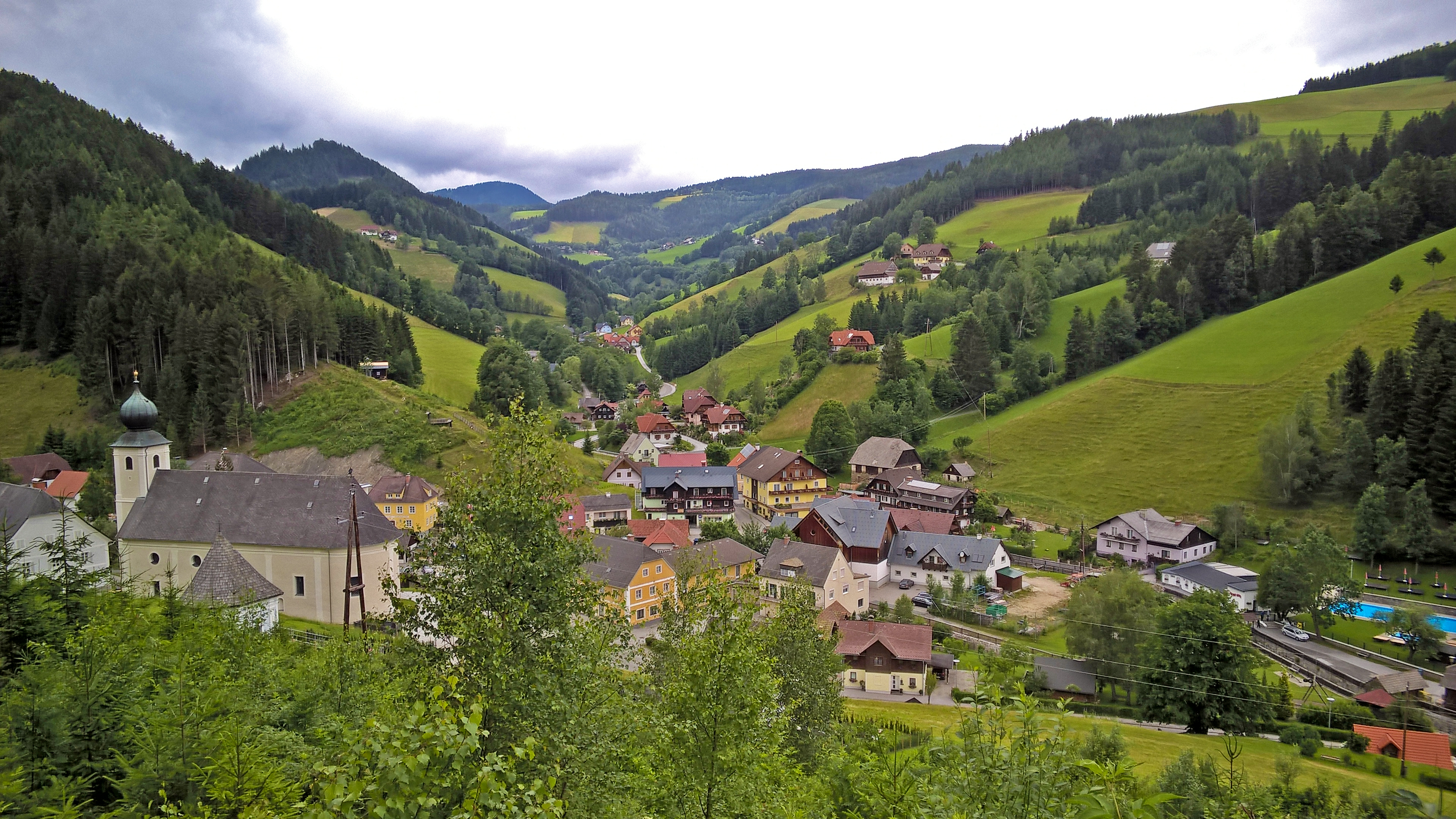 Der Ort Gasen von der Pfarrwiese aus gesehen Richtung Strasseggsattel im Sommer 2015.